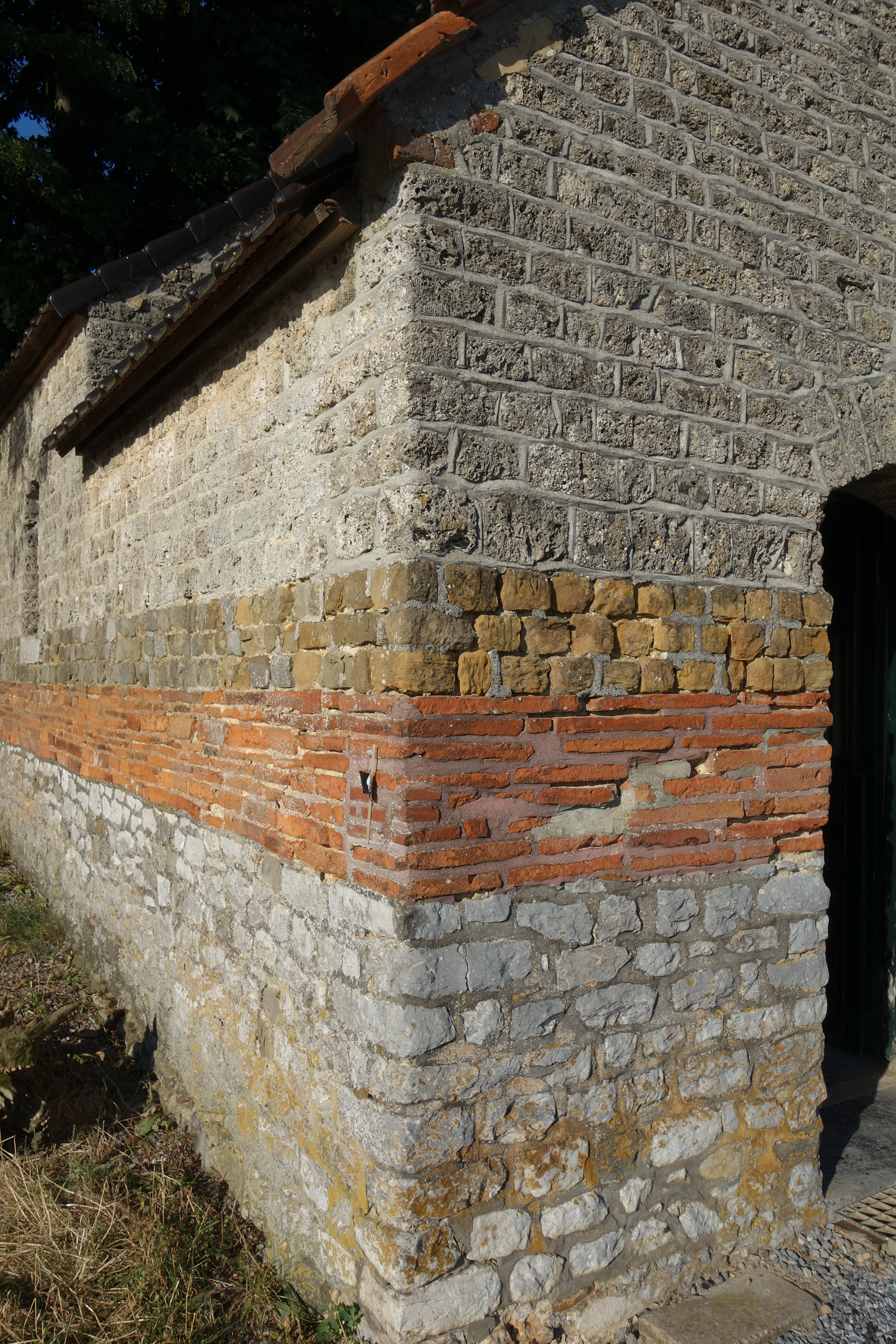 Vier verschillende oude bouwmaterialen van de Steenboskapel in Schophem (Voeren, België), in juli 2020.